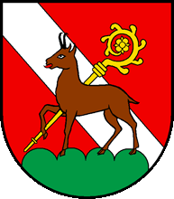 Wappen von Botterens Kanton Freiburg Schweiz